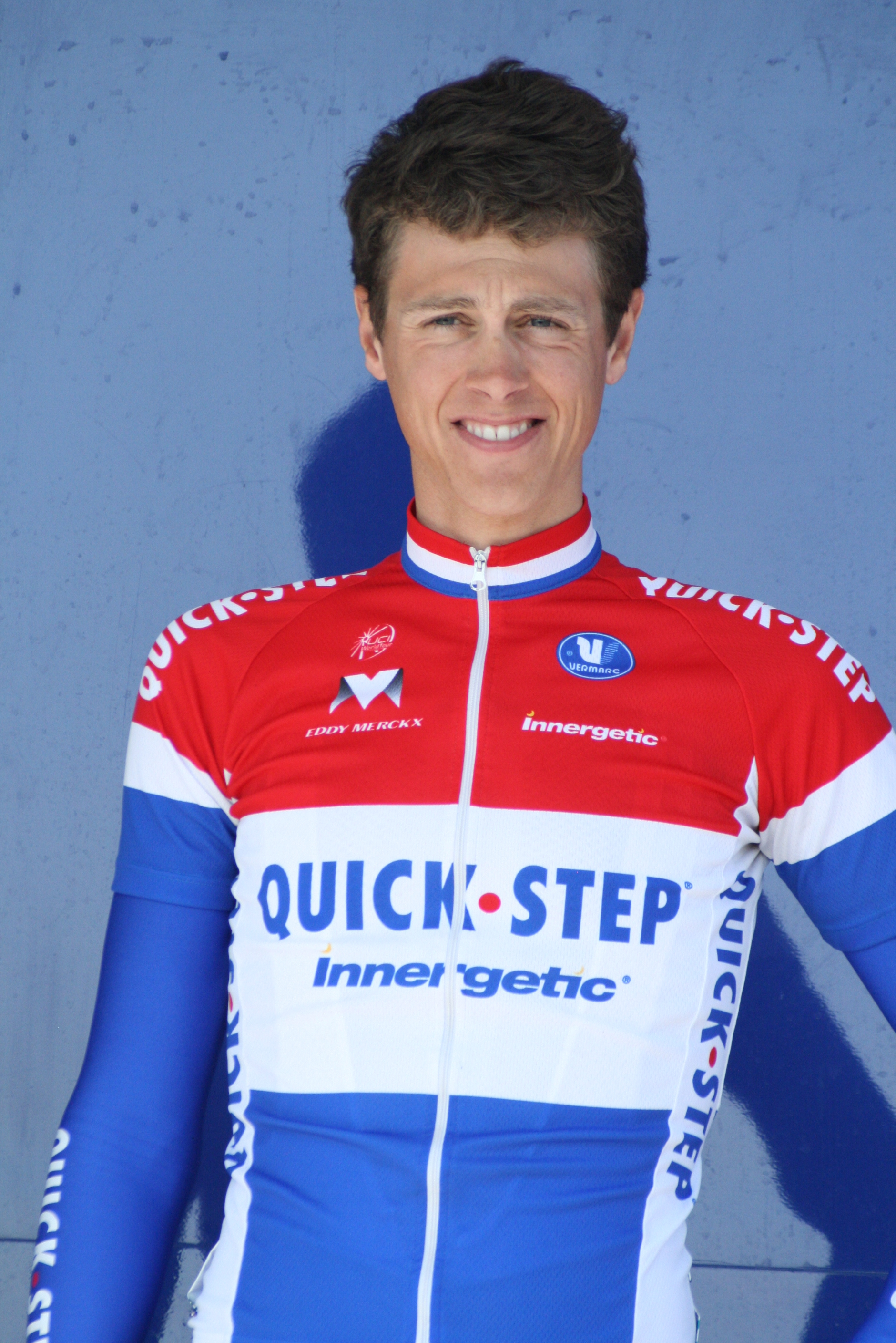 Présentation des coureurs au départ de la première étape Niki Terpstra